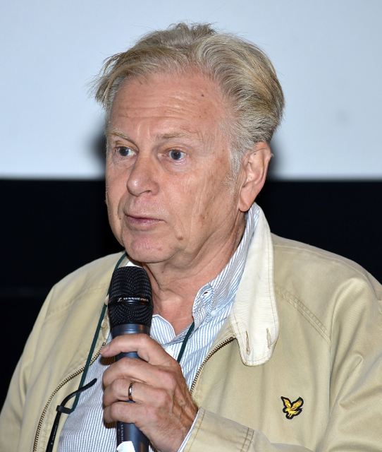 PeÅ Holmquist under presentation av den Svenska filmhösten 2014 på Bio Victor i Filmhuset i Stockholm den 18 augusti 2014. Arrangörer: Svenska Filminstitutet och Film&TV-Producenterna.